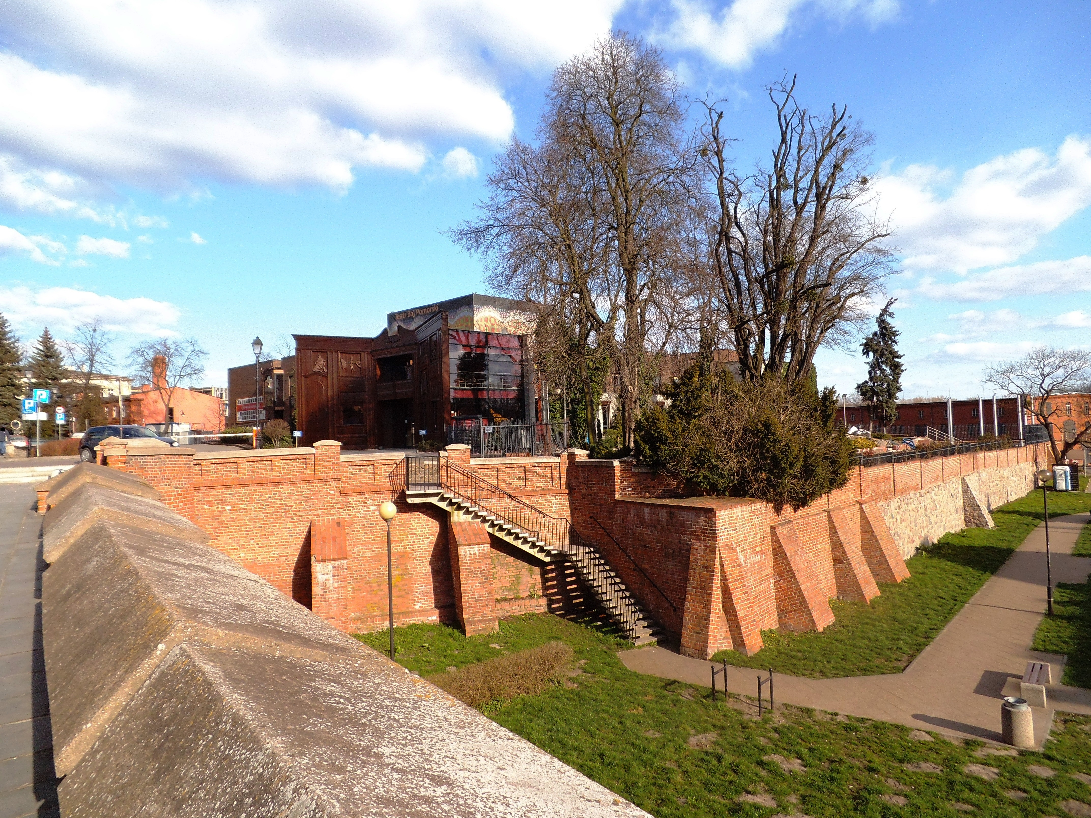 Baj Pomorski w Toruniu, 2020